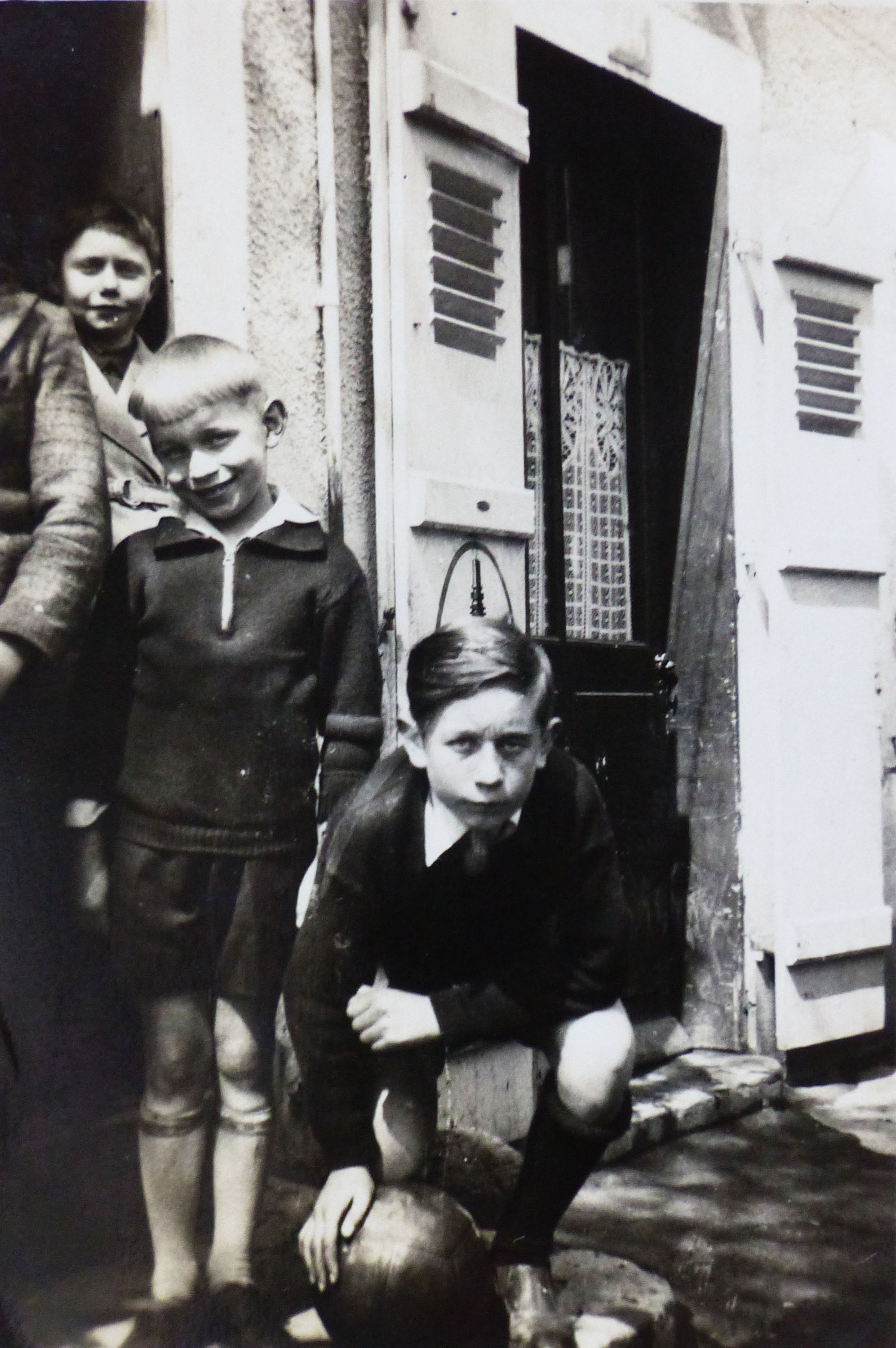 Jean et Jacques Collot et leur cousin germain Guy Couturet jouent au football à Vesoul (1929)